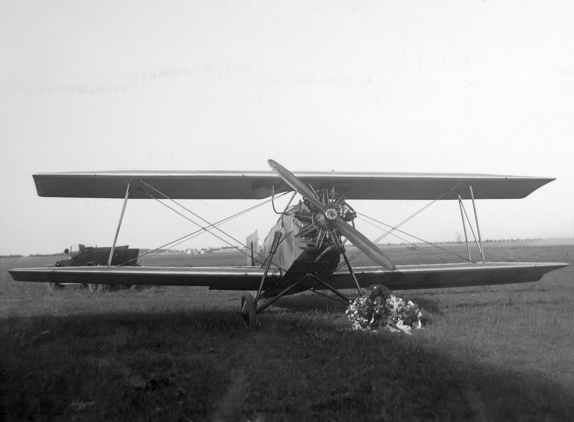 letecký motor Walter NZ-120 a letoun Avia BH-29.1 (1928)